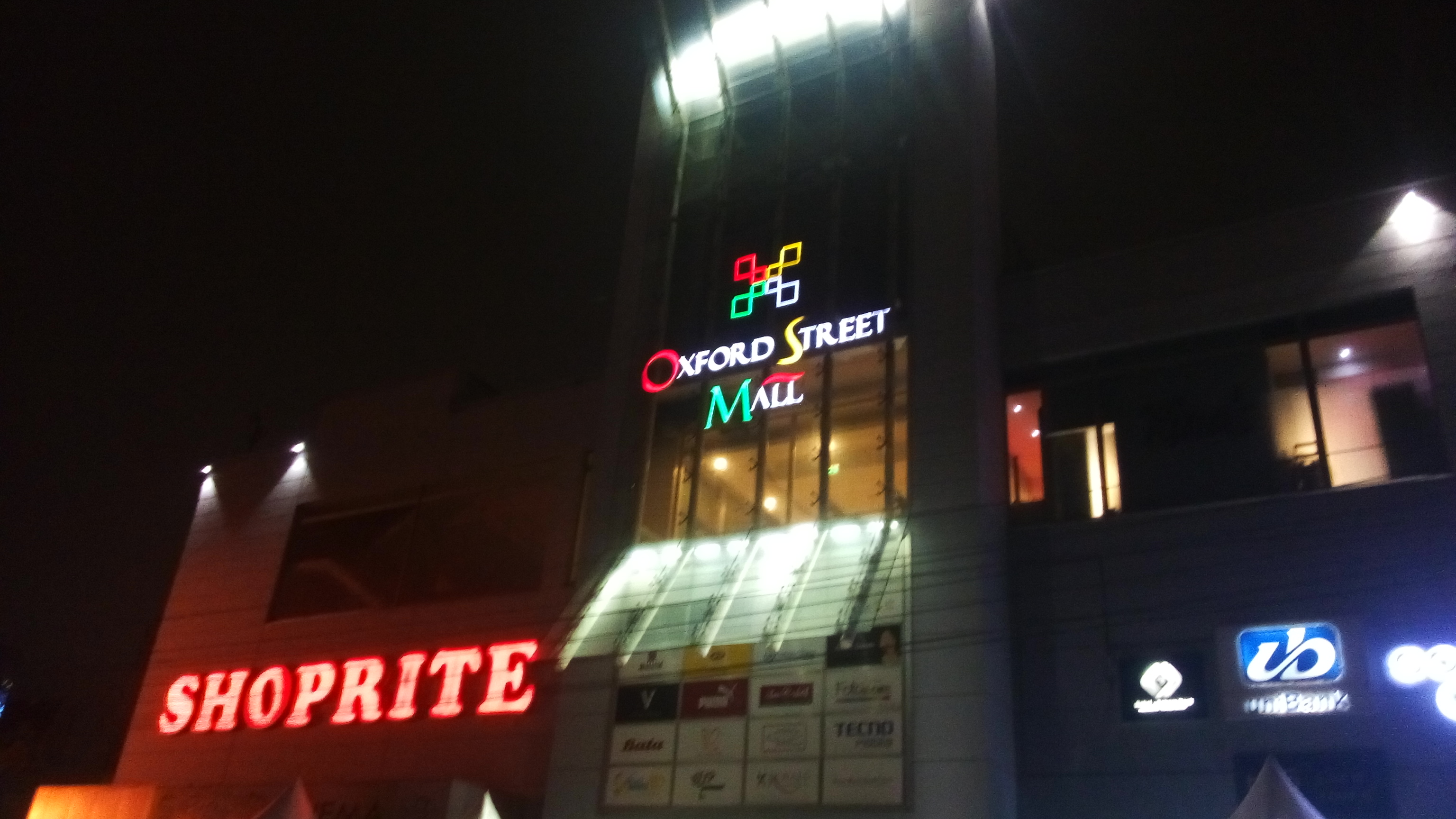 Oxford Street Mall Osu